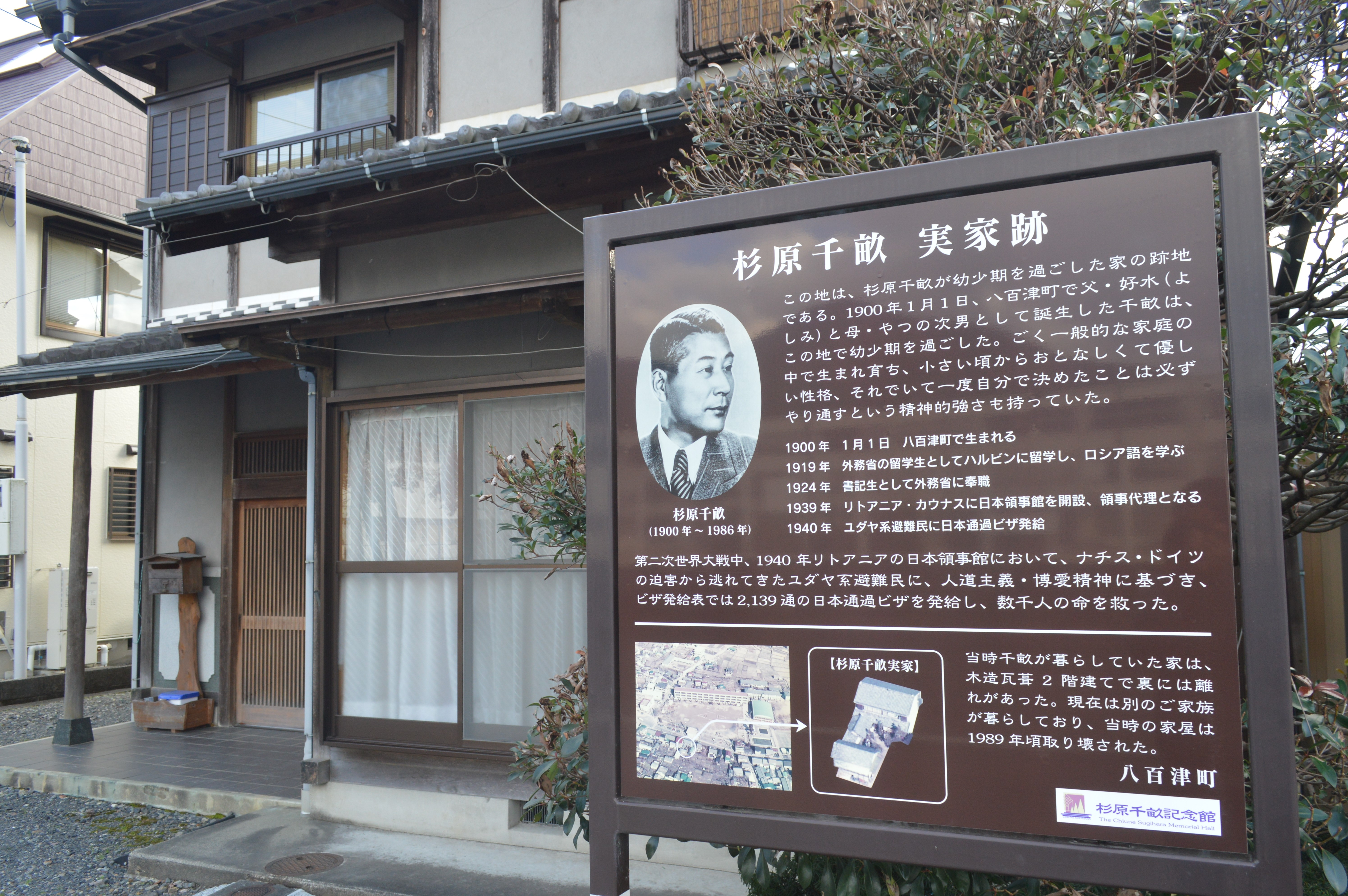 岐阜県加茂郡八百津町にある杉原千畝の実家跡。